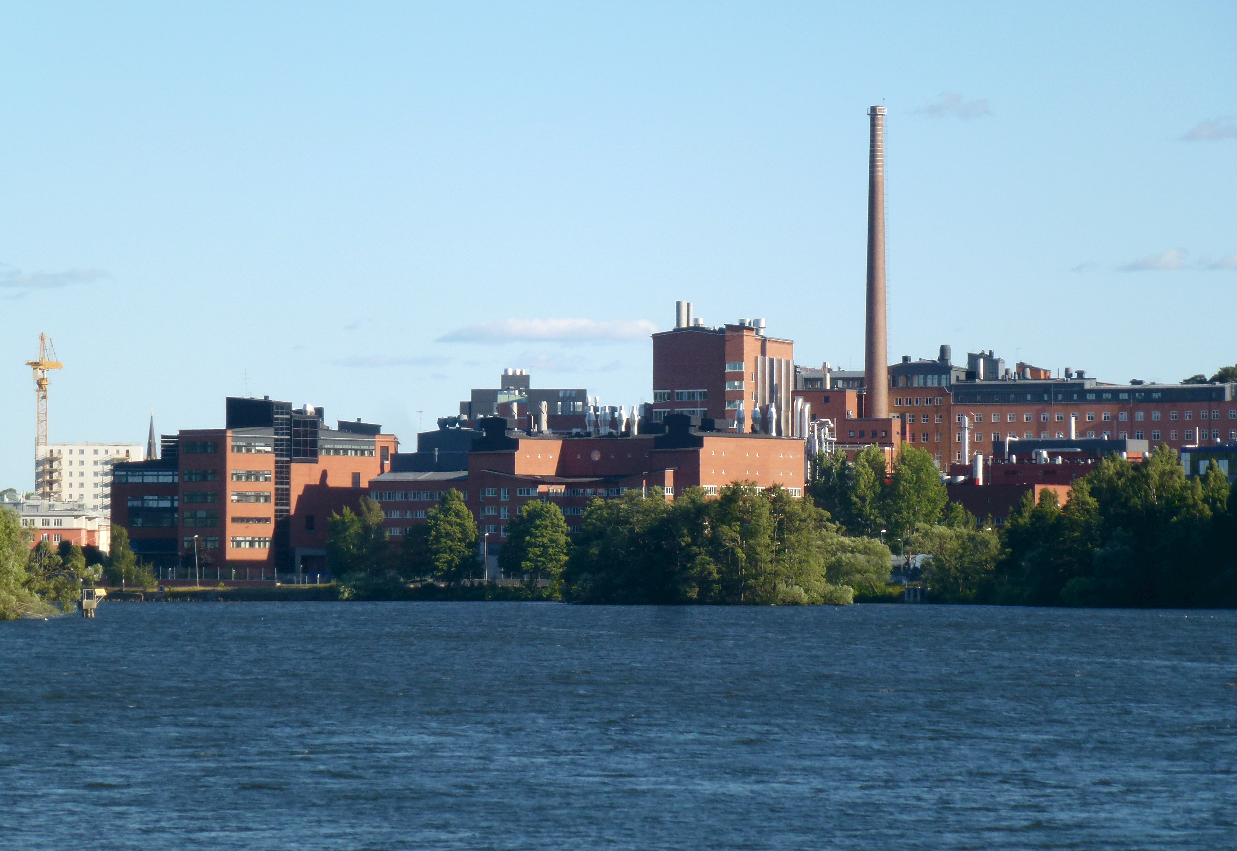 AstraZeneca anläggningen i Södertälje